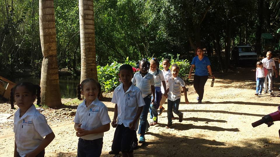 Estudiantes de una escuela local en Cabarete luego de visitar el lugar, República Dominicana.